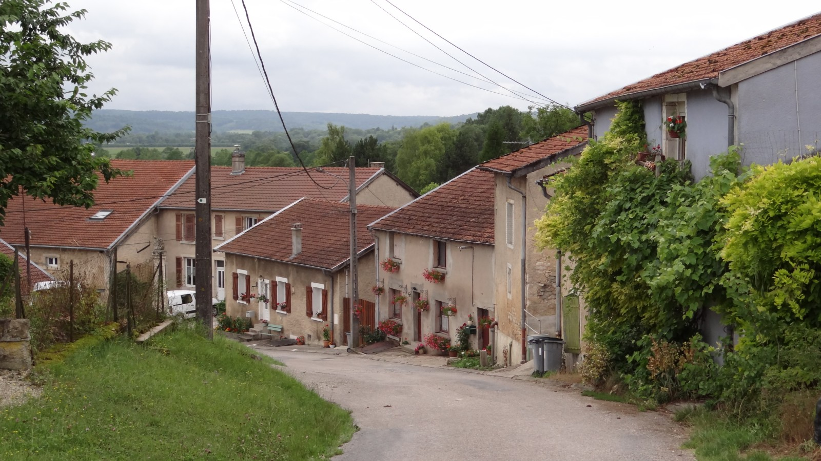 Ailly-sur-Meuse (55) Rue d'Apremont